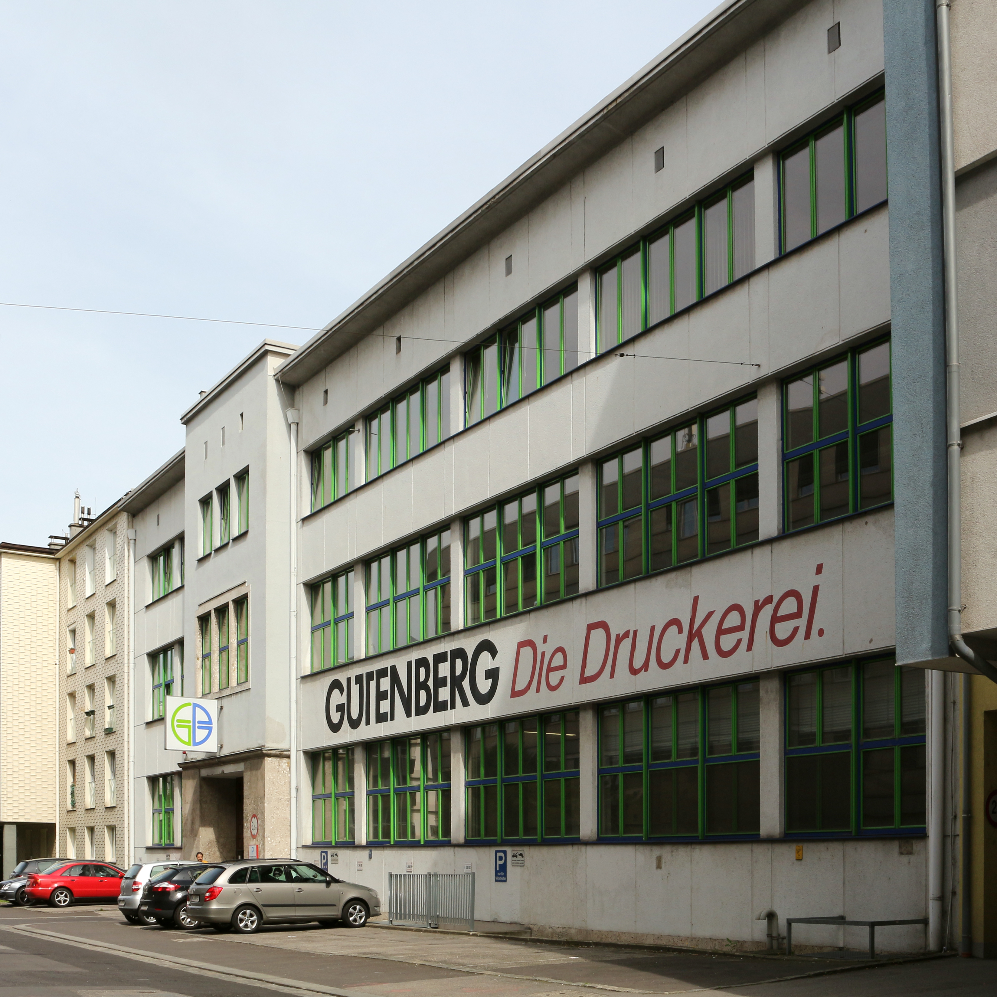 Druckerei Gutenberg in Linz